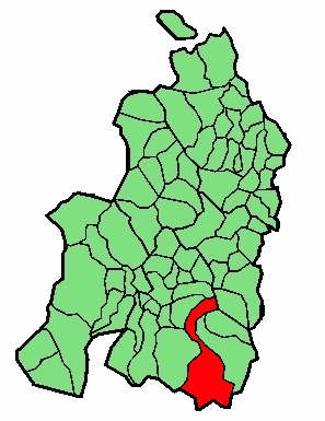 aipaturiko udalerriaren kokapena Nafarroa Beherean